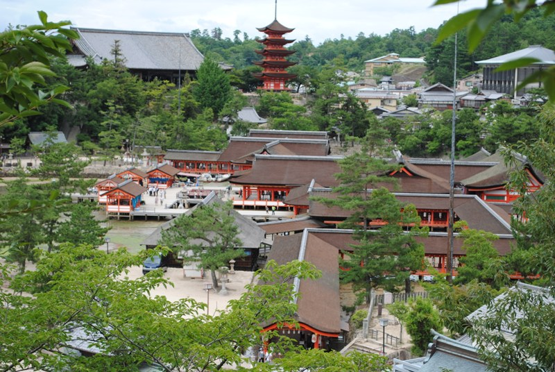 Santuario de Itsukushima